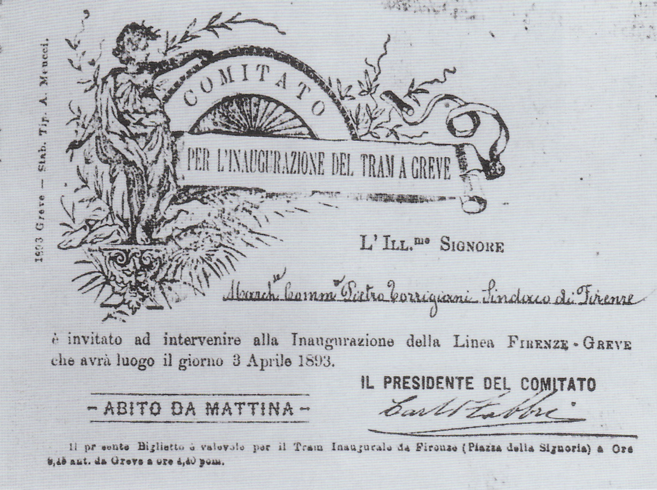 Biglietto d'invito alla inaugurazione della Tramvia del Chianti (1893)